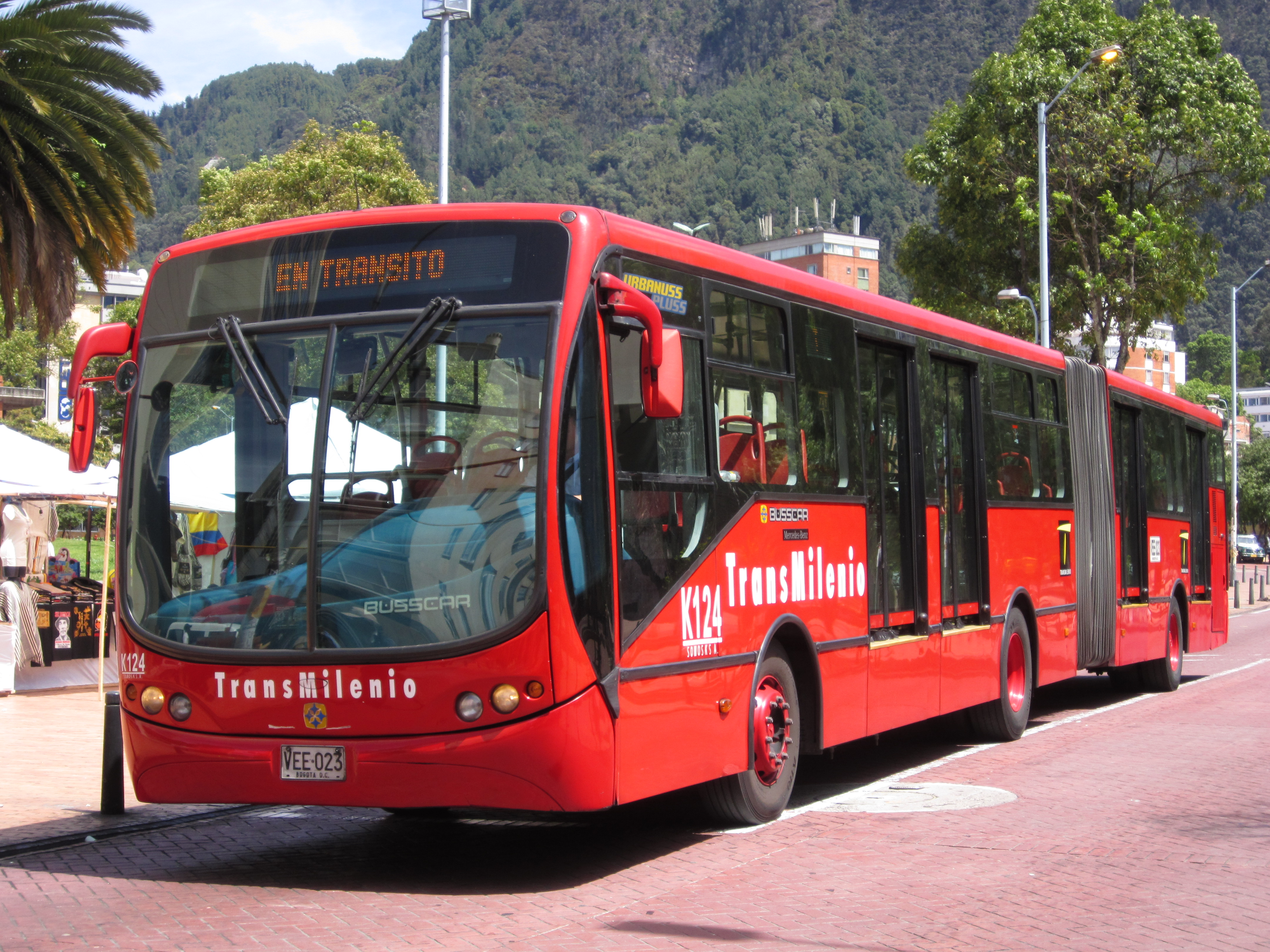 Bus de Transmilenio en el eje ambiental de Bogotá.